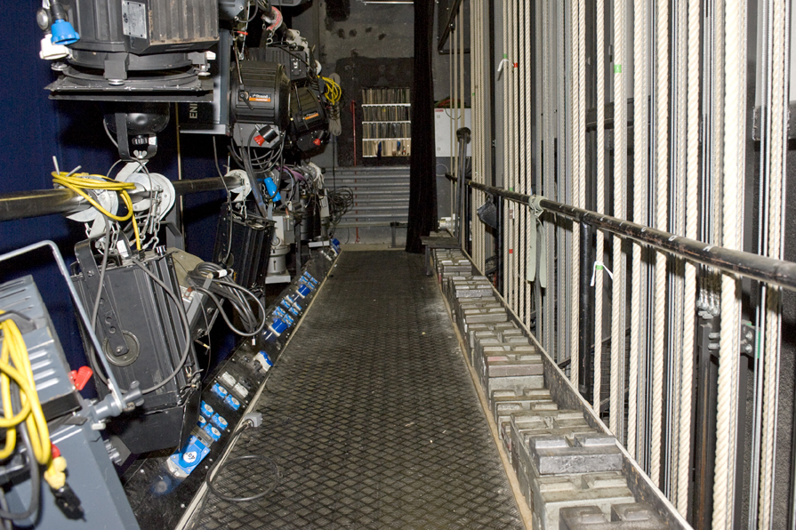 Gewichtsgalerie